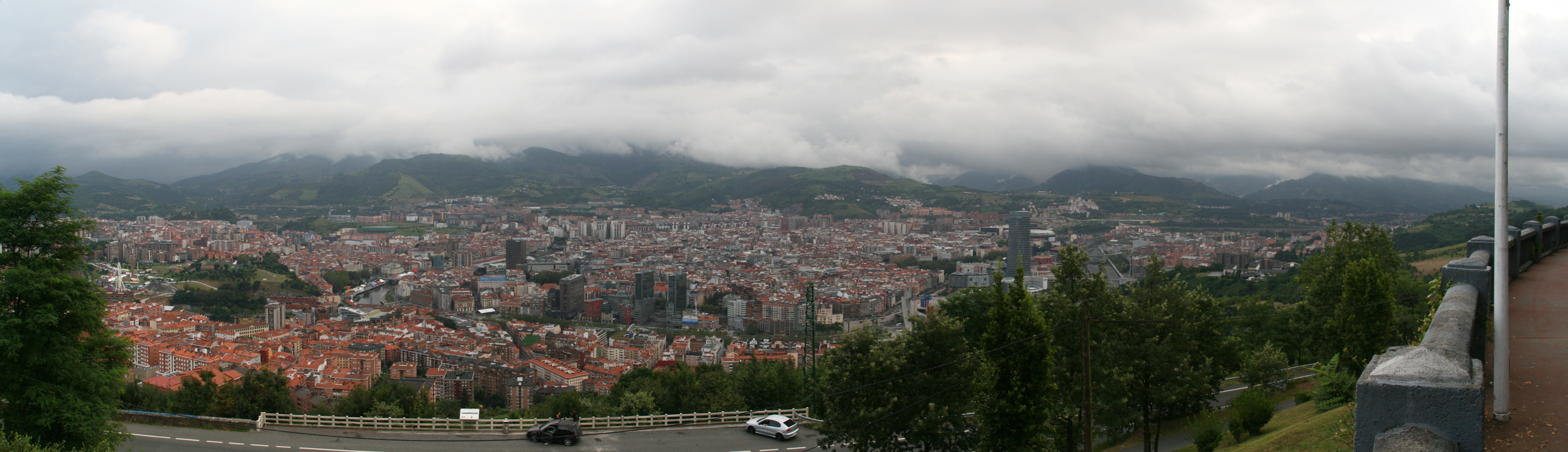 Bilbao desde Artxanda